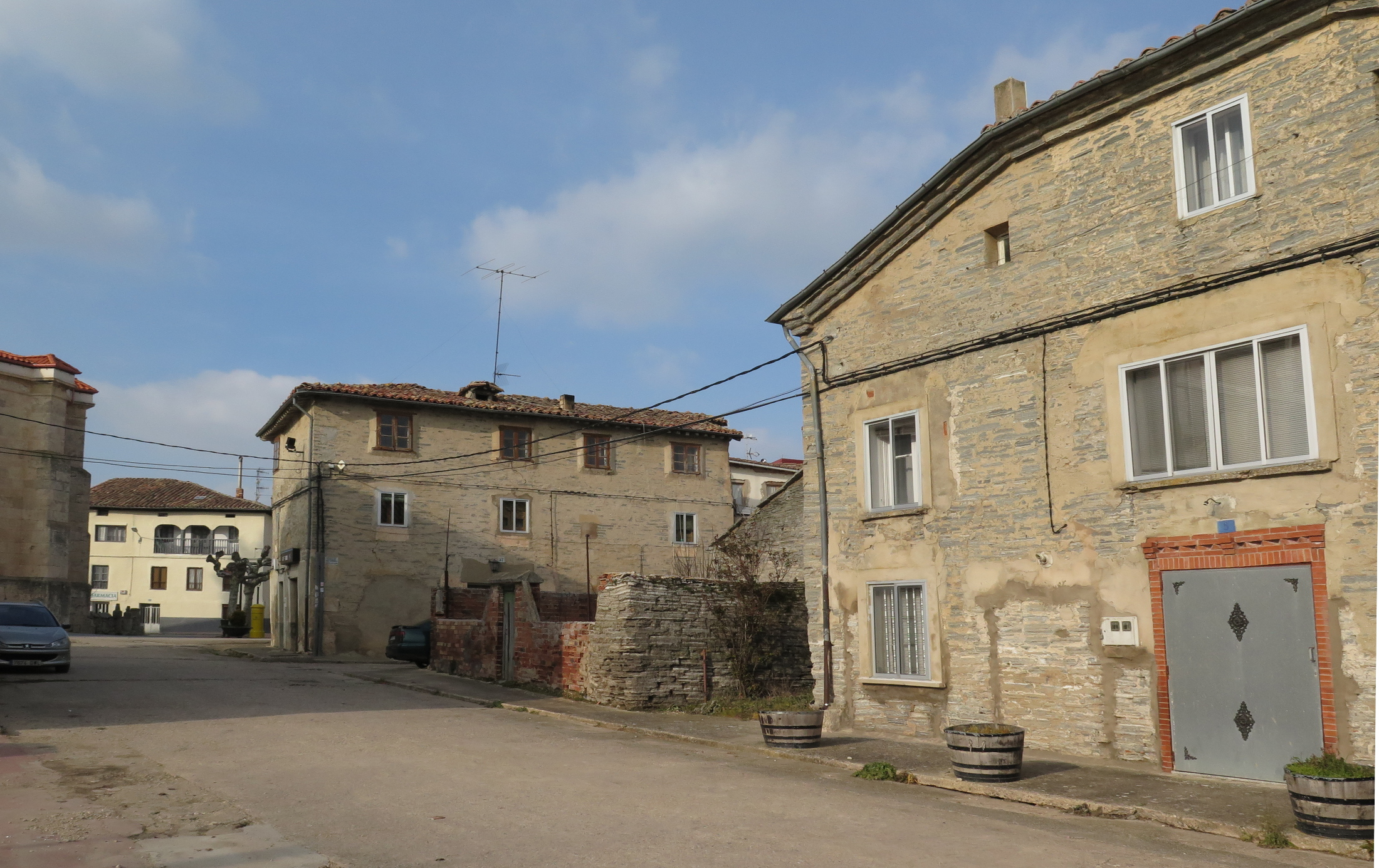 Calle San Millán de Cubo de Bureba (Burgos, España)